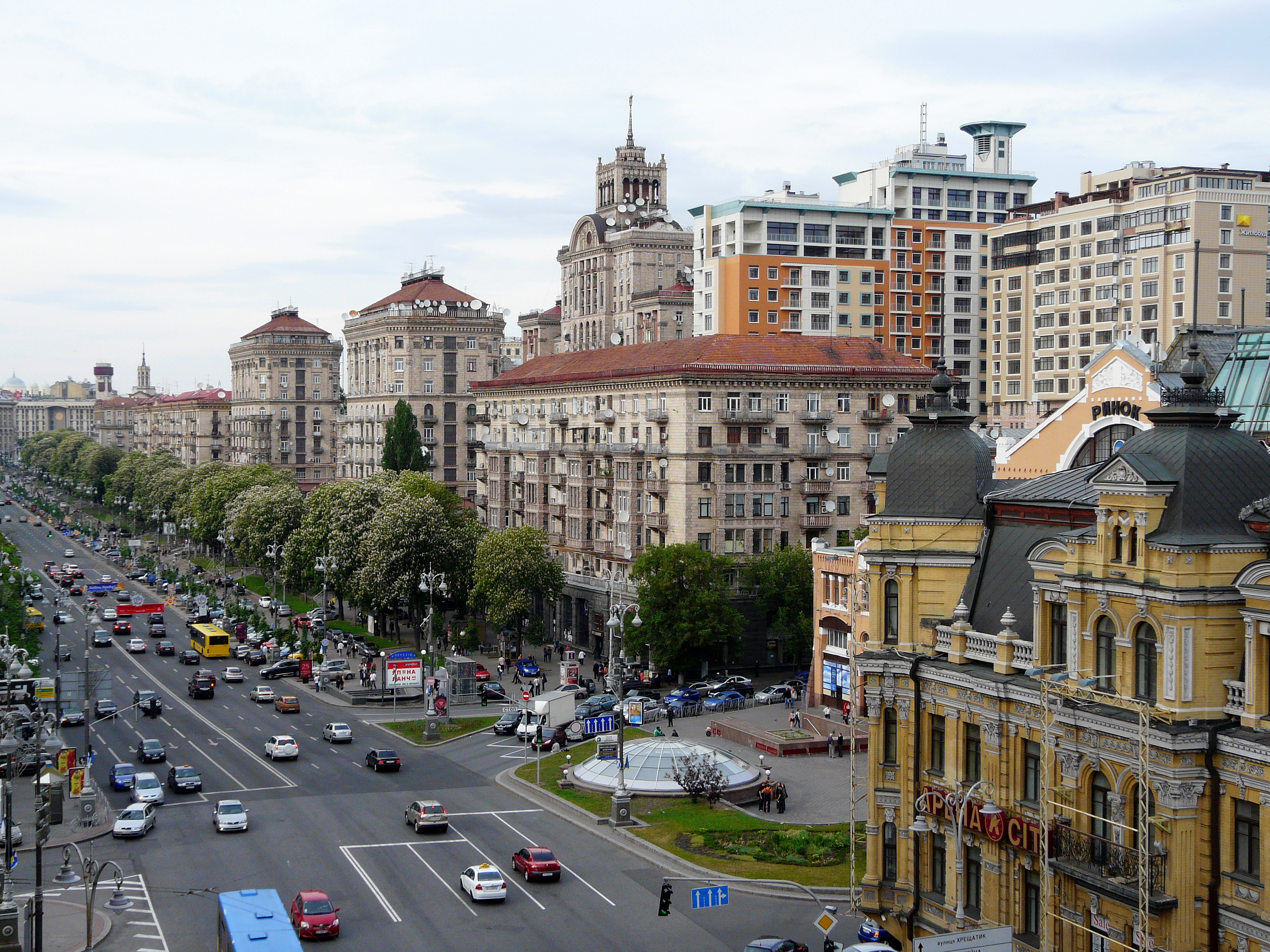 Вулиця Хрещатик, Київ, вул. Хрещатик